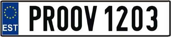 Дилерский номер Эстонии